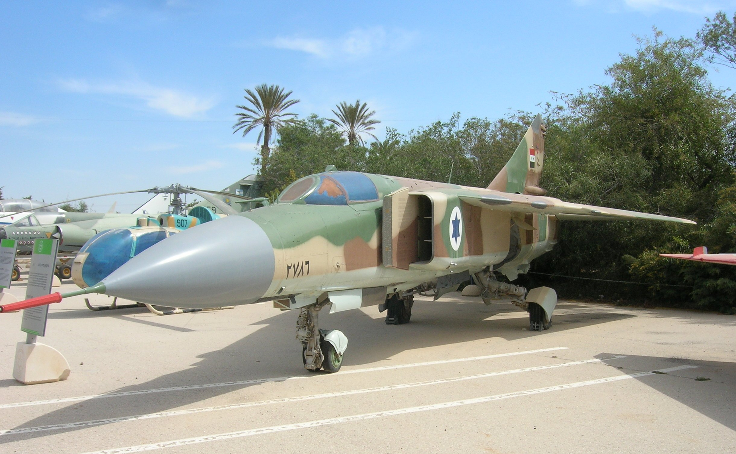 Mikoyan Mig-23 M2D